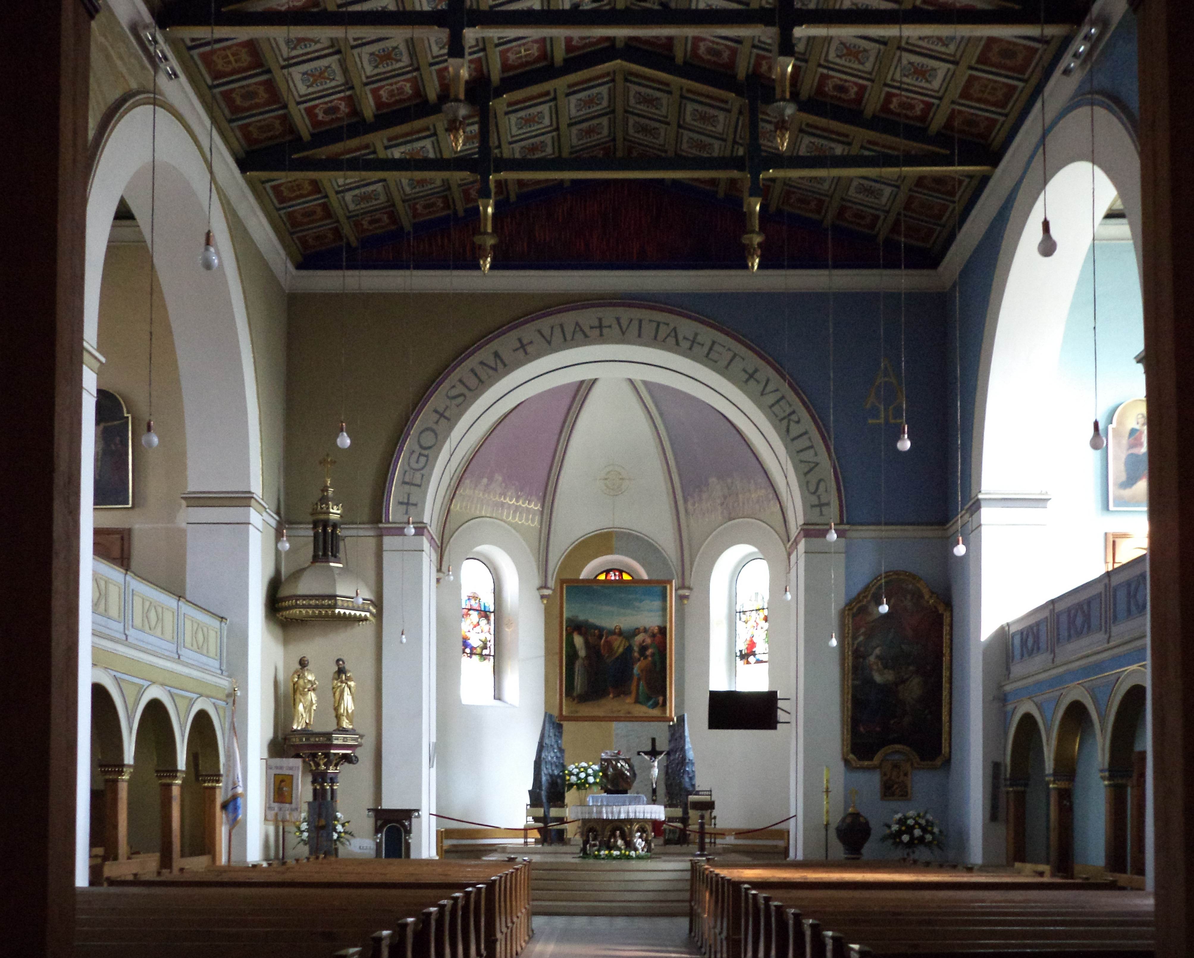 Wnętrze kościoła św. Ap. Piotra i Pawła w Tarnowskich Górach